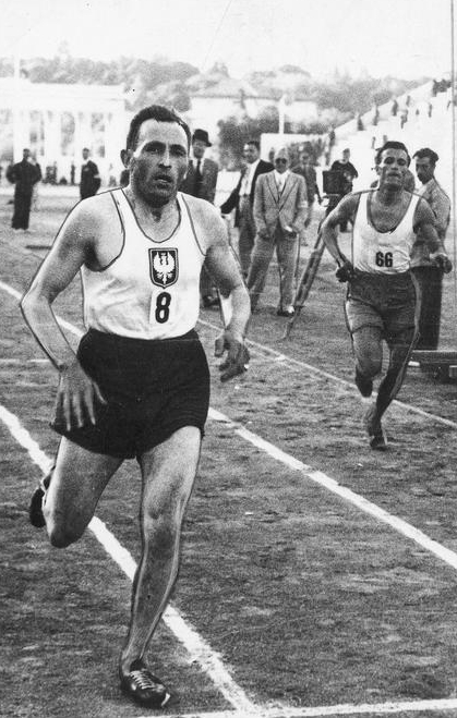 Trójmecz lekkoatletyczny Grecja - Polska - Czechosłowacja w Atenach 1937 - Józef Noji.